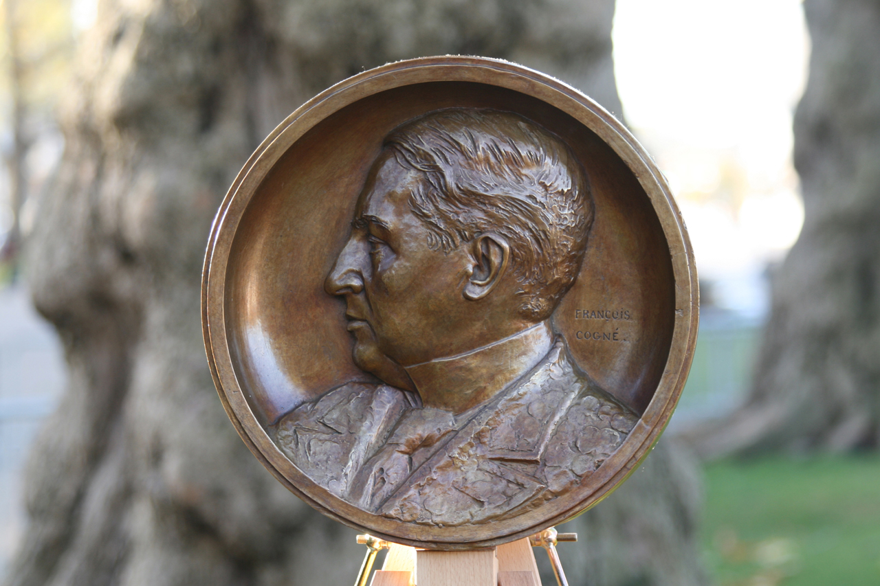 Medaillon commémorant Georges Mandel